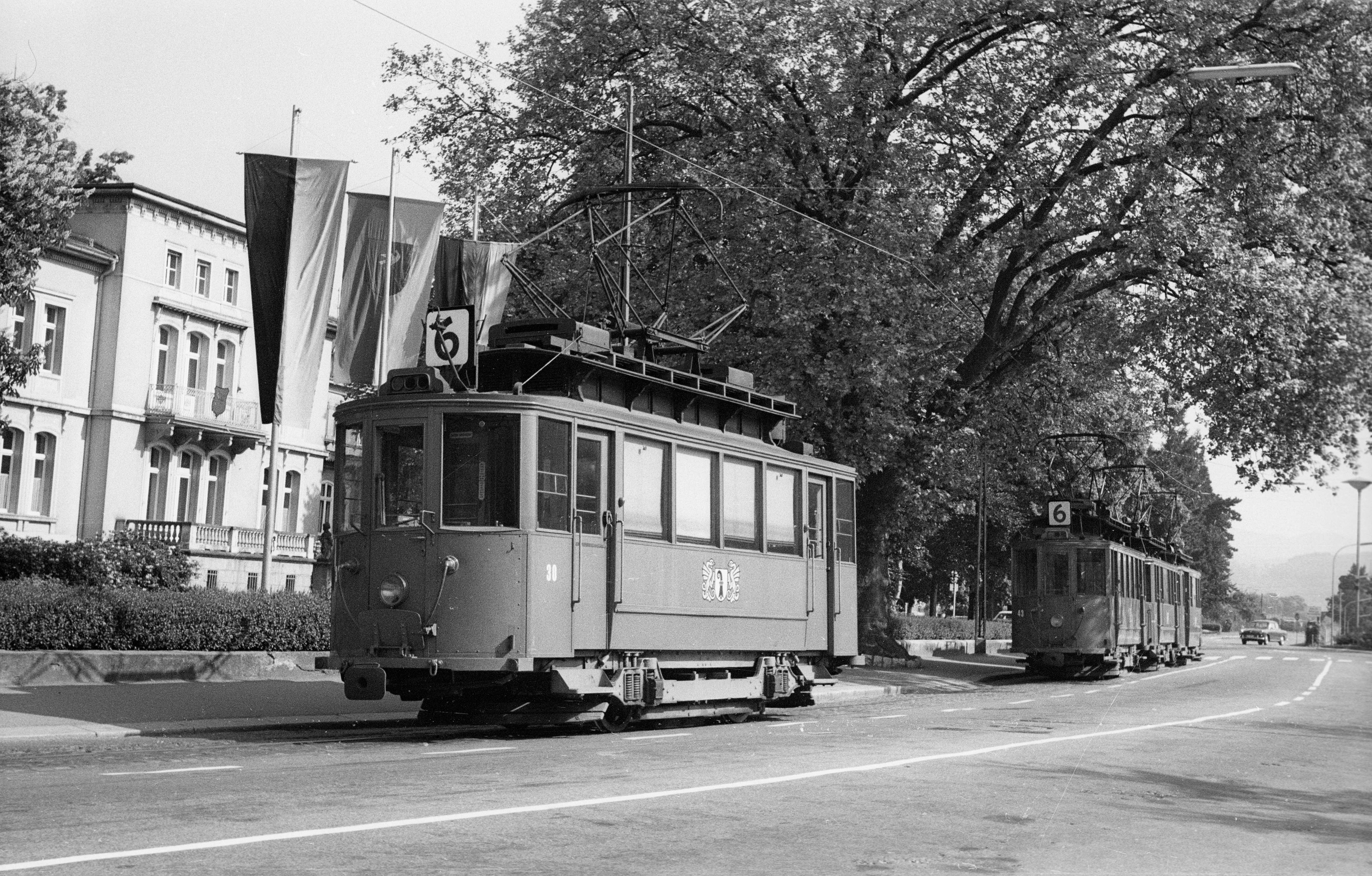 Lörrach Tram vor dem Rathaus